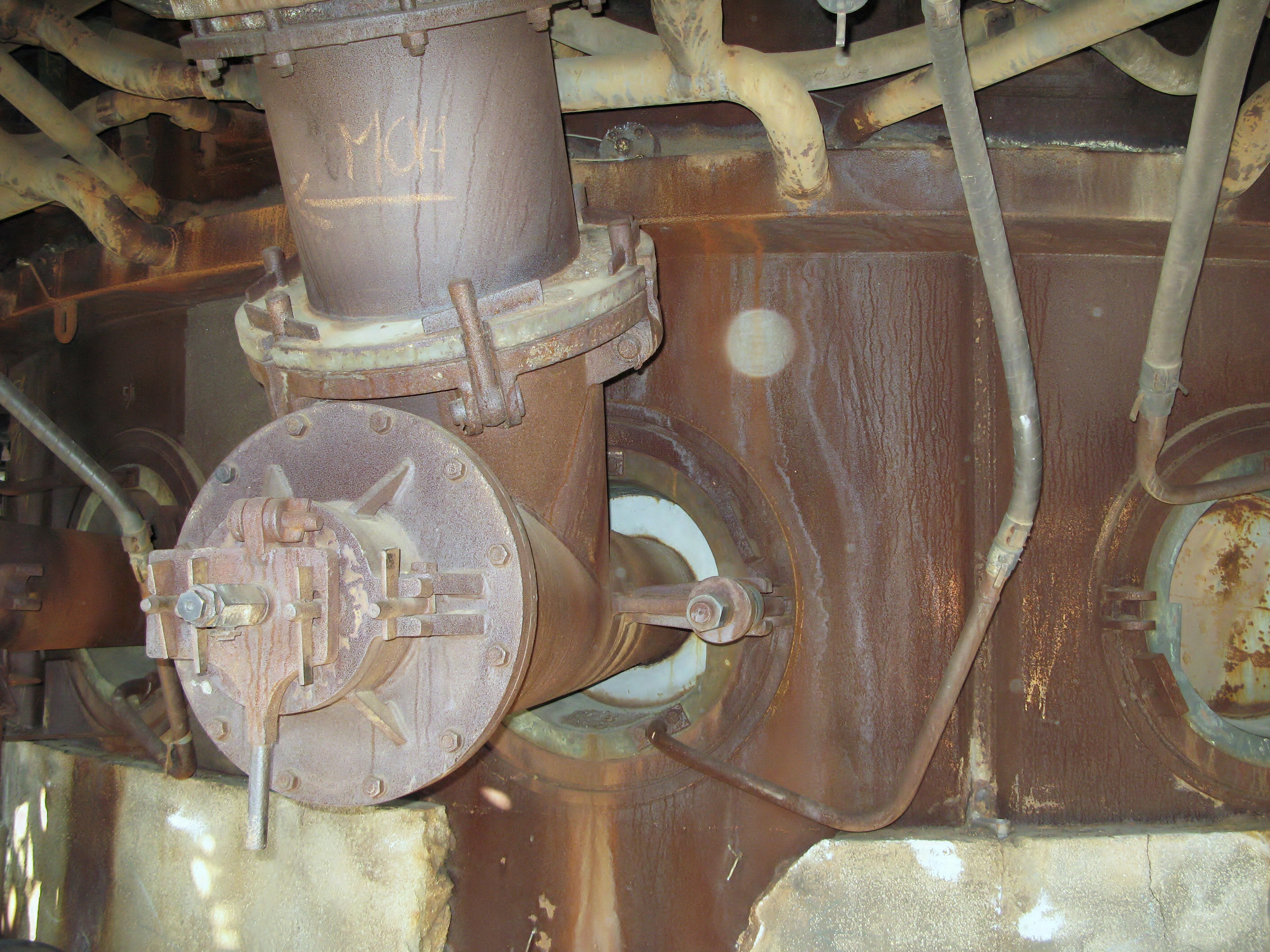 Landschaftspark Duisburg-Nord - Hochofen 5, Düse der Heißwindringleitung